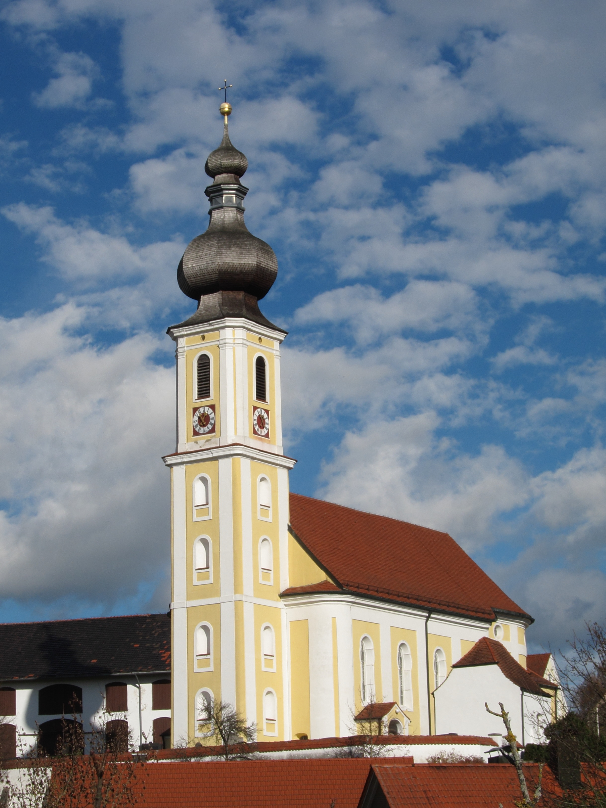 Katholische Pfarrkirche und ehemalige Wallfahrtskirche Mariae Heimsuchung, Saalbau mit eingezogenem halbrunden Chor, angefügter Sakristei und Zwiebelturm, erbaut von Johann Baptist Lethner 1750/51.